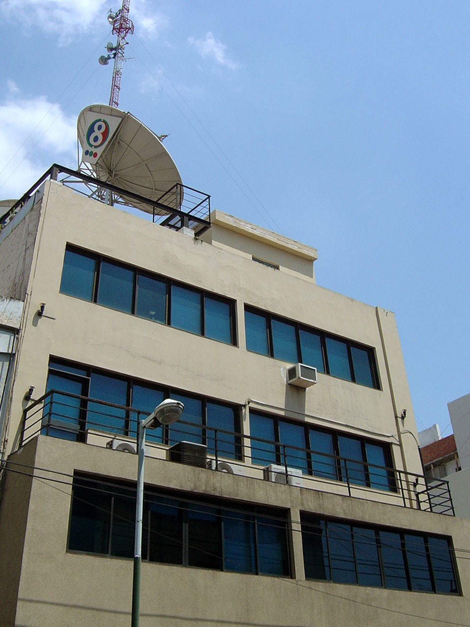 Channel 8 studios, San Miguel de Tucumán, Argentina